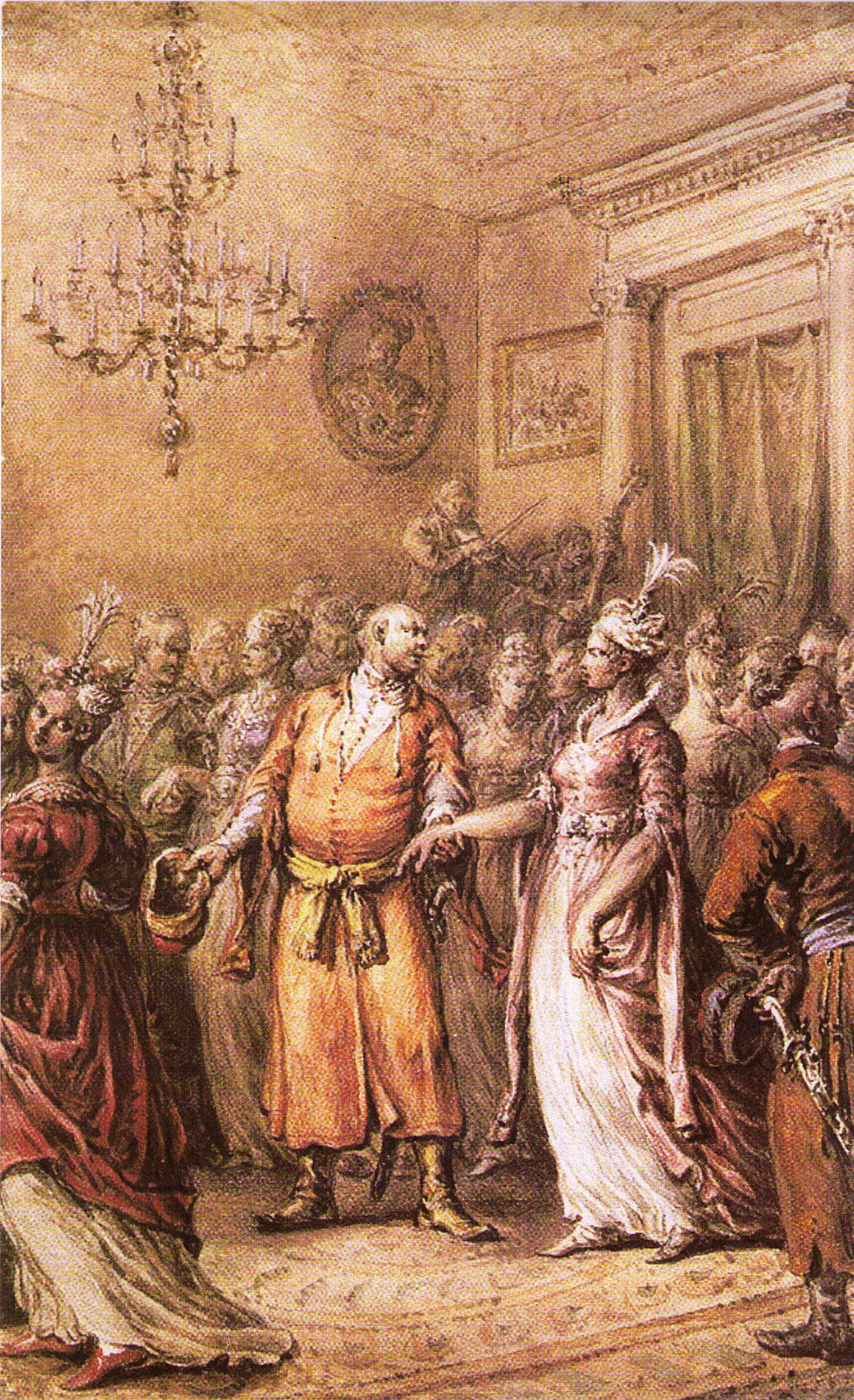 Polonez